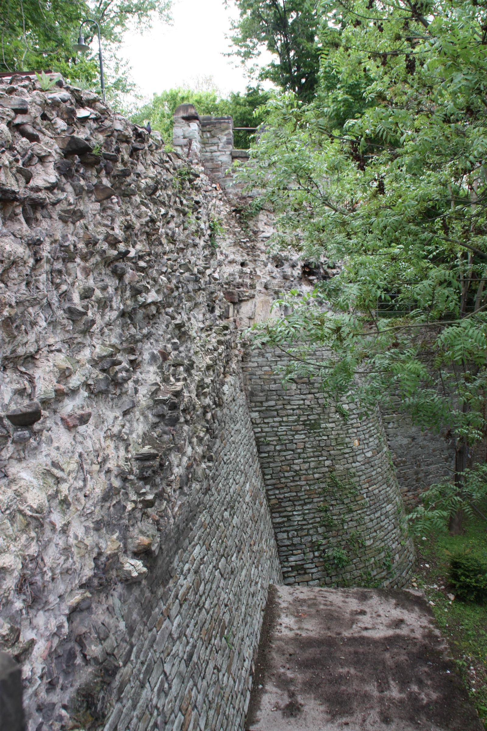 Reste der sog. "Heidenmauer" in Wiesbaden, Hessen, Deutschland. Fotografiert vom Römertor in Blickrichtung Schulberg. Das älteste Wiesbadener Bauwerk wurde während unter der Herrschaft des Imperium Romanum errichtet.